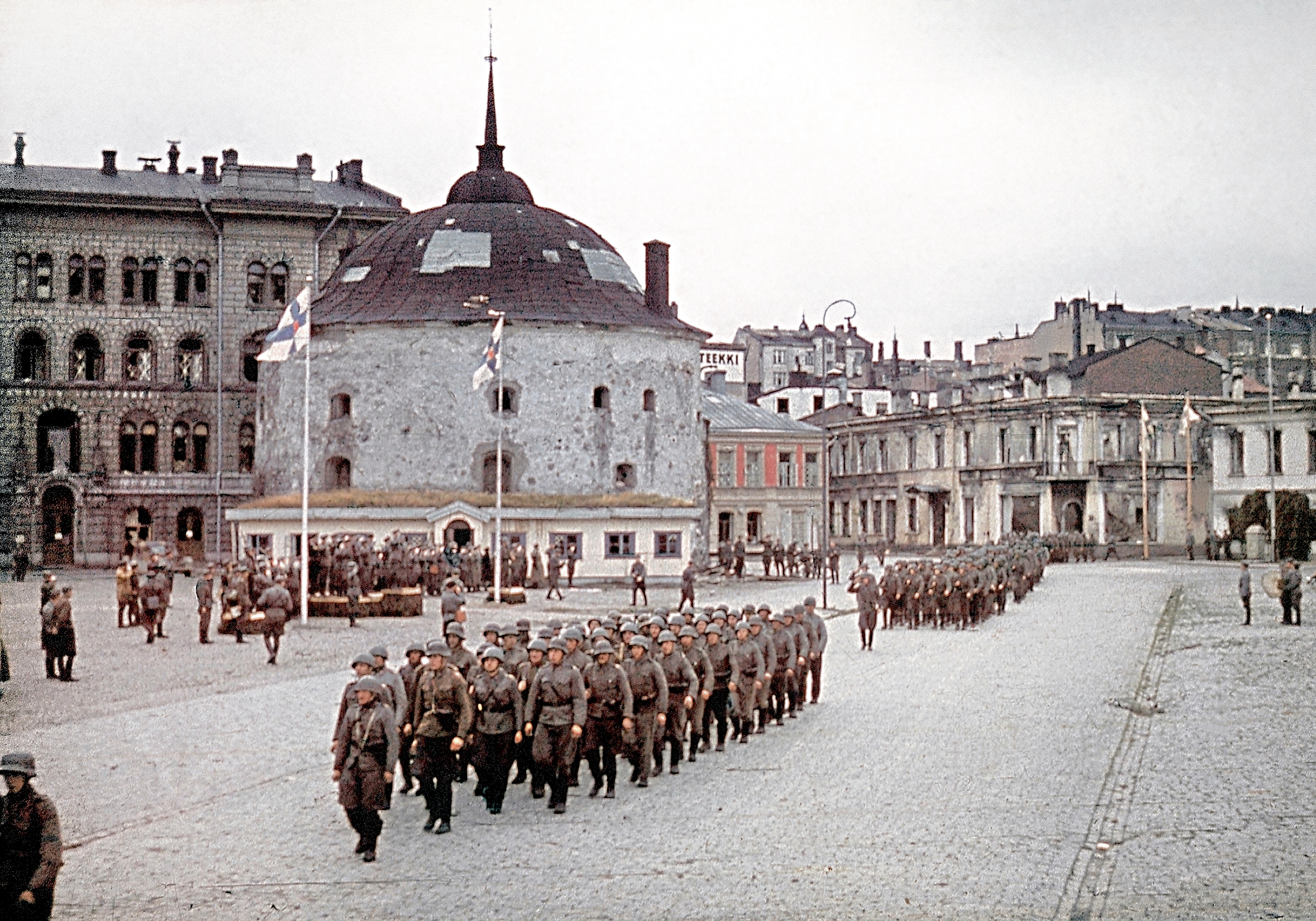 Viipurin takaisinvaltauksen paraati 31.8.1941. Viipurin valtauksen kunniaksi järjestetty paraati Pyöreän tornin edustalla.